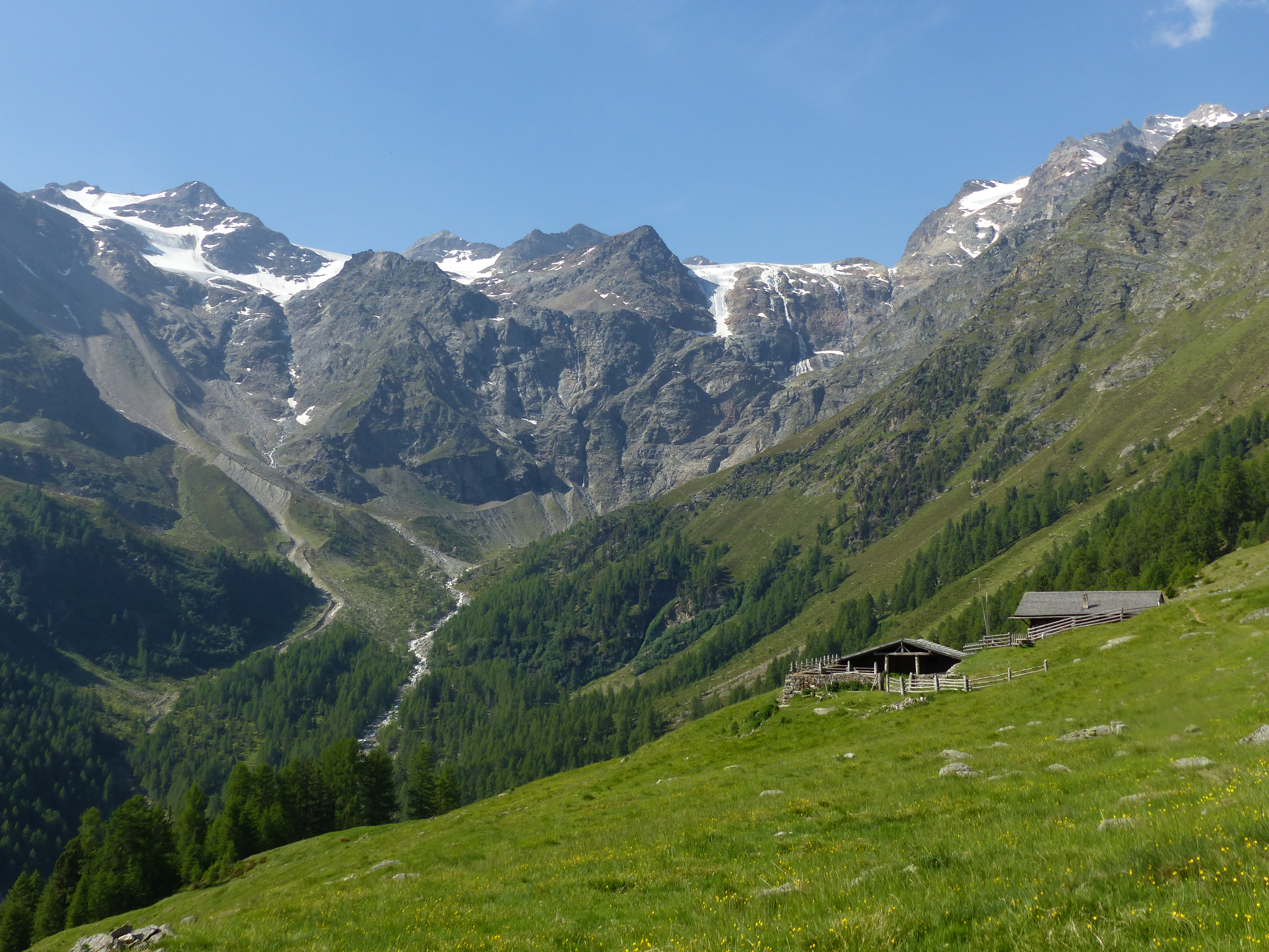 Talschluss des Laaser Tals: Obere Laaser Alm mit Laaser Ferner